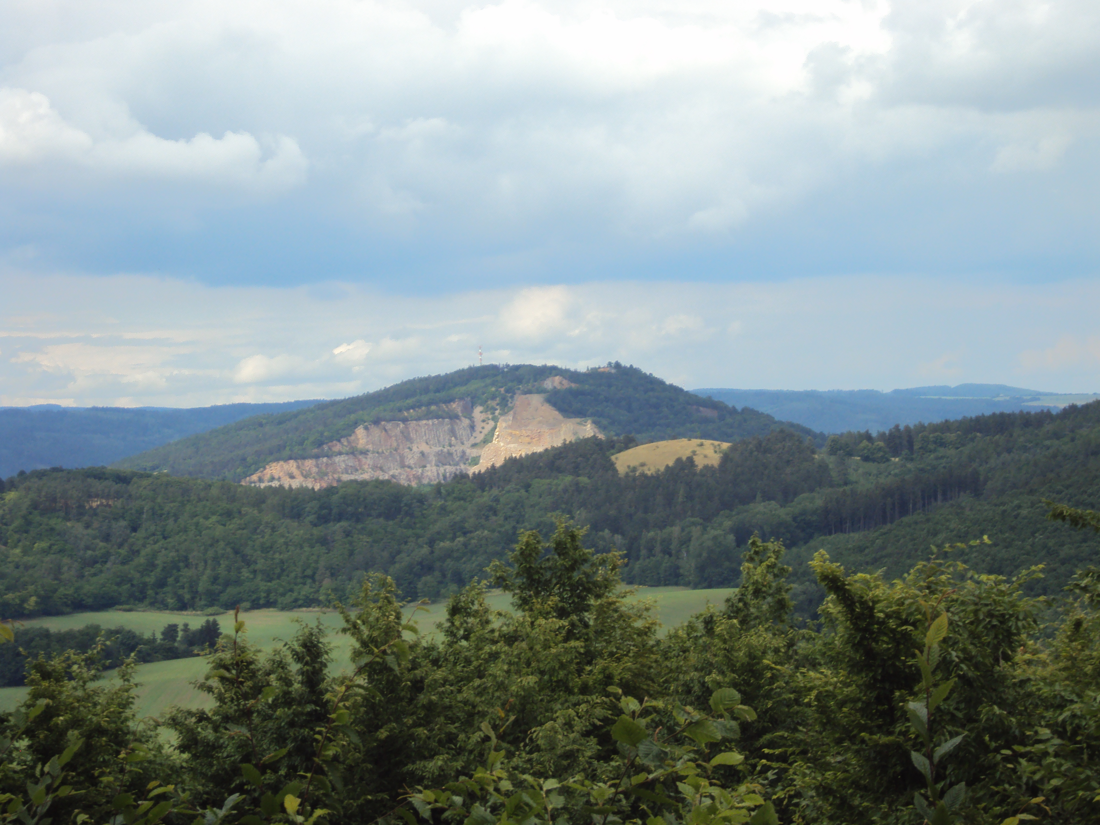 Kopec Čebínka Pohled z Podkomorských lesů